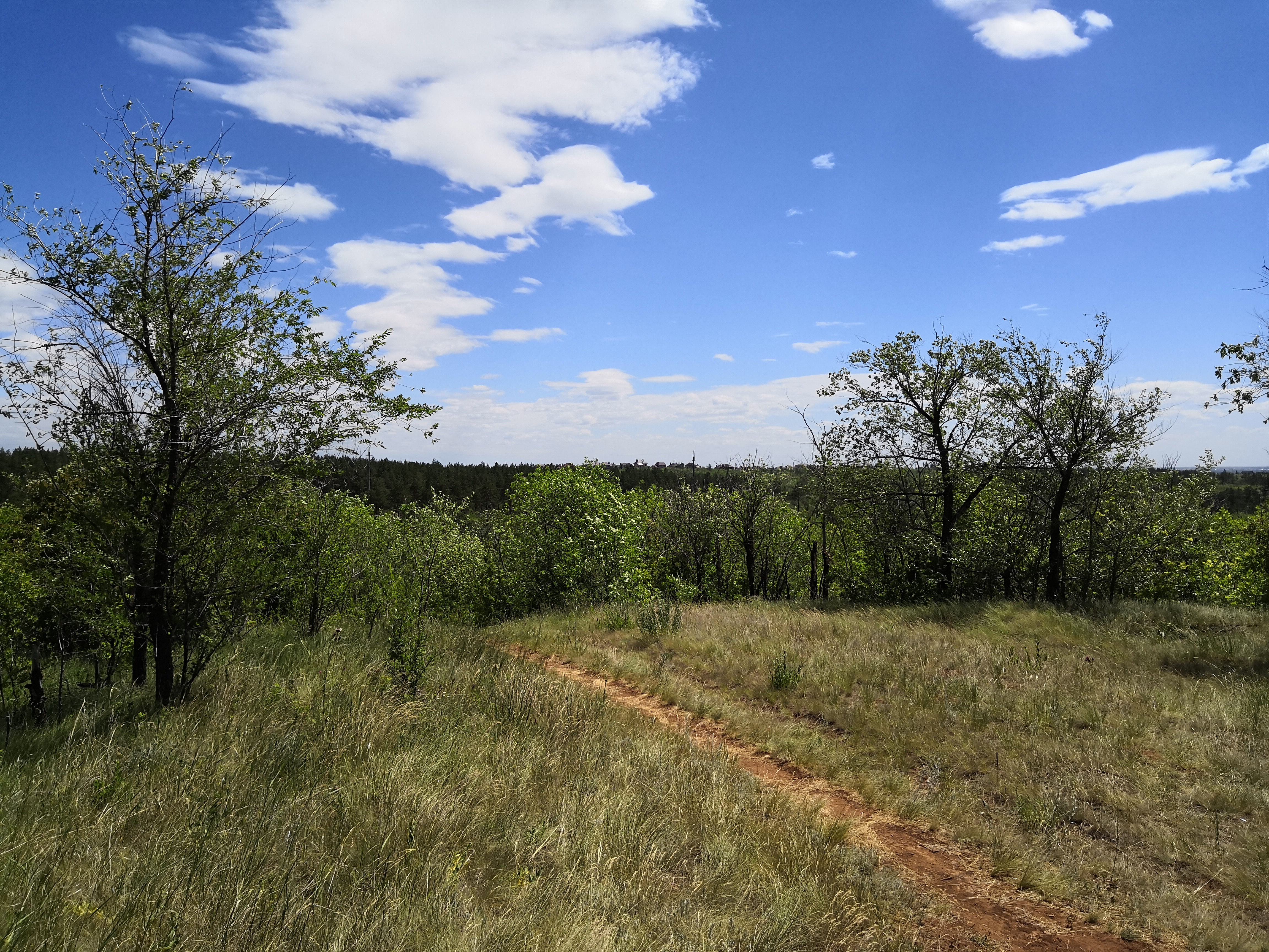 Природа Качкарского парка в Оренбурге